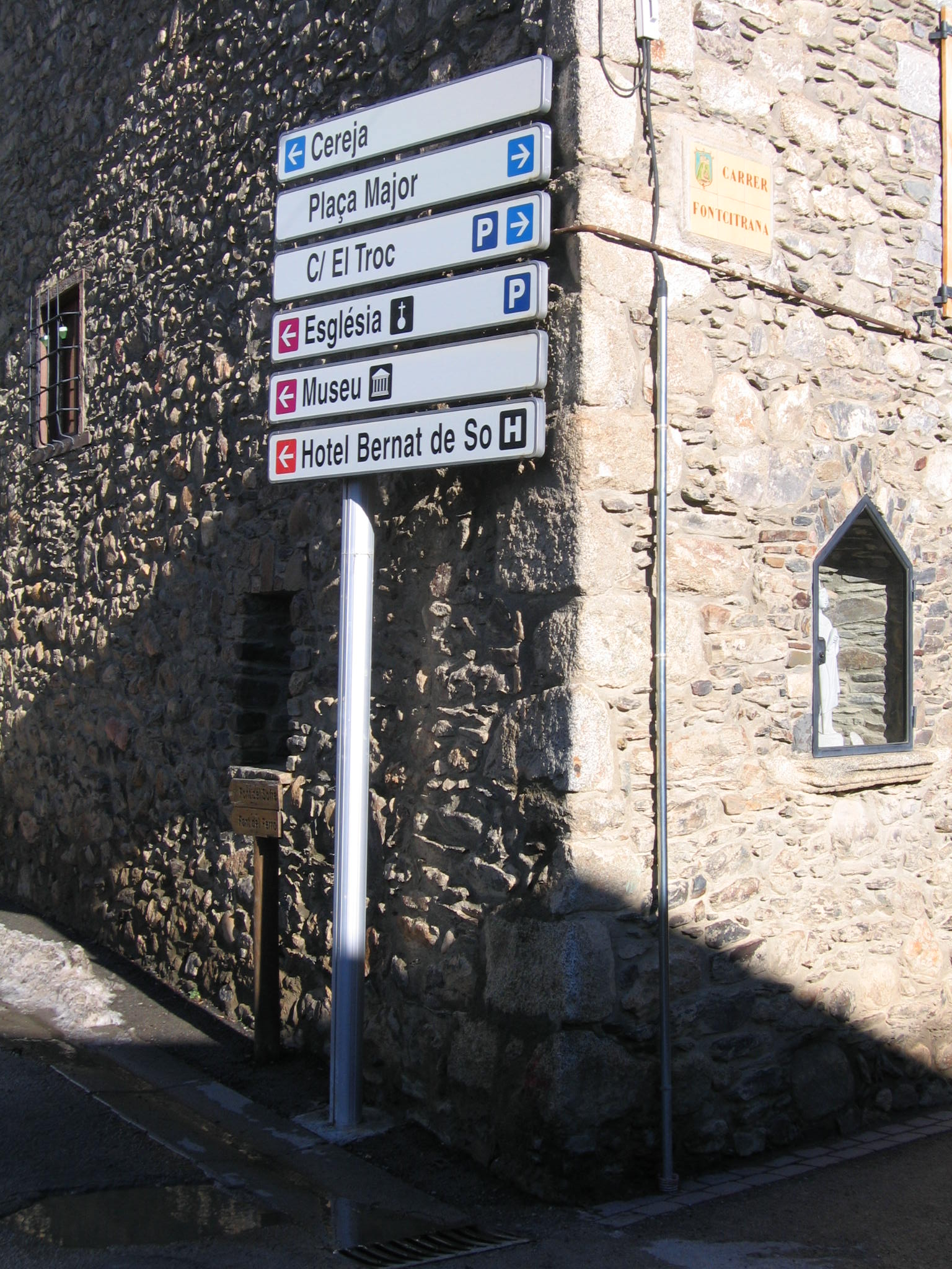 Enclave espagnole de Llívia, panneaux en catalan, rue Citrana.